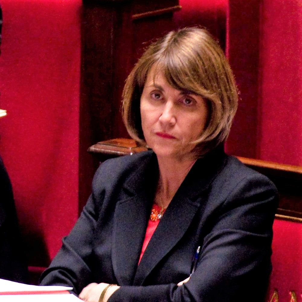 Christine Albanel lors des débats sur la Loi Création et Internet. CC Richard Ying pour LePost.fr